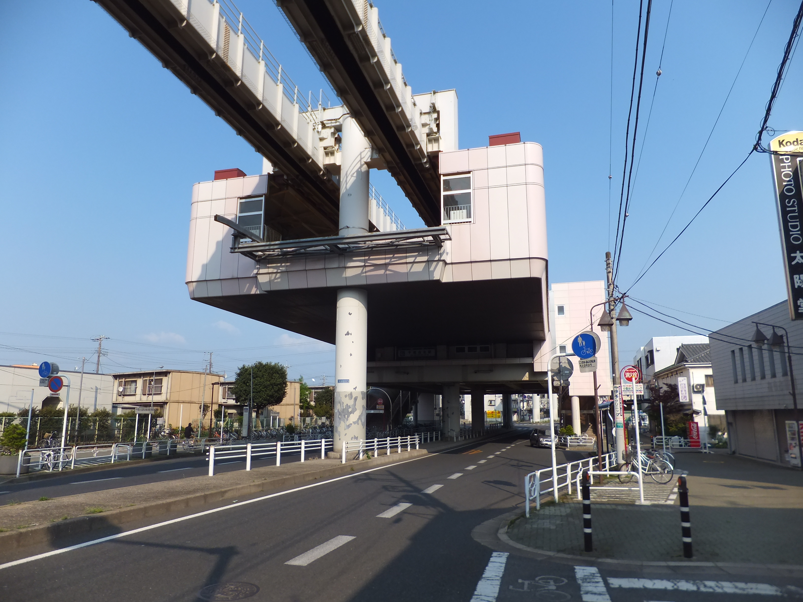 千葉都市モノレール千城台北駅